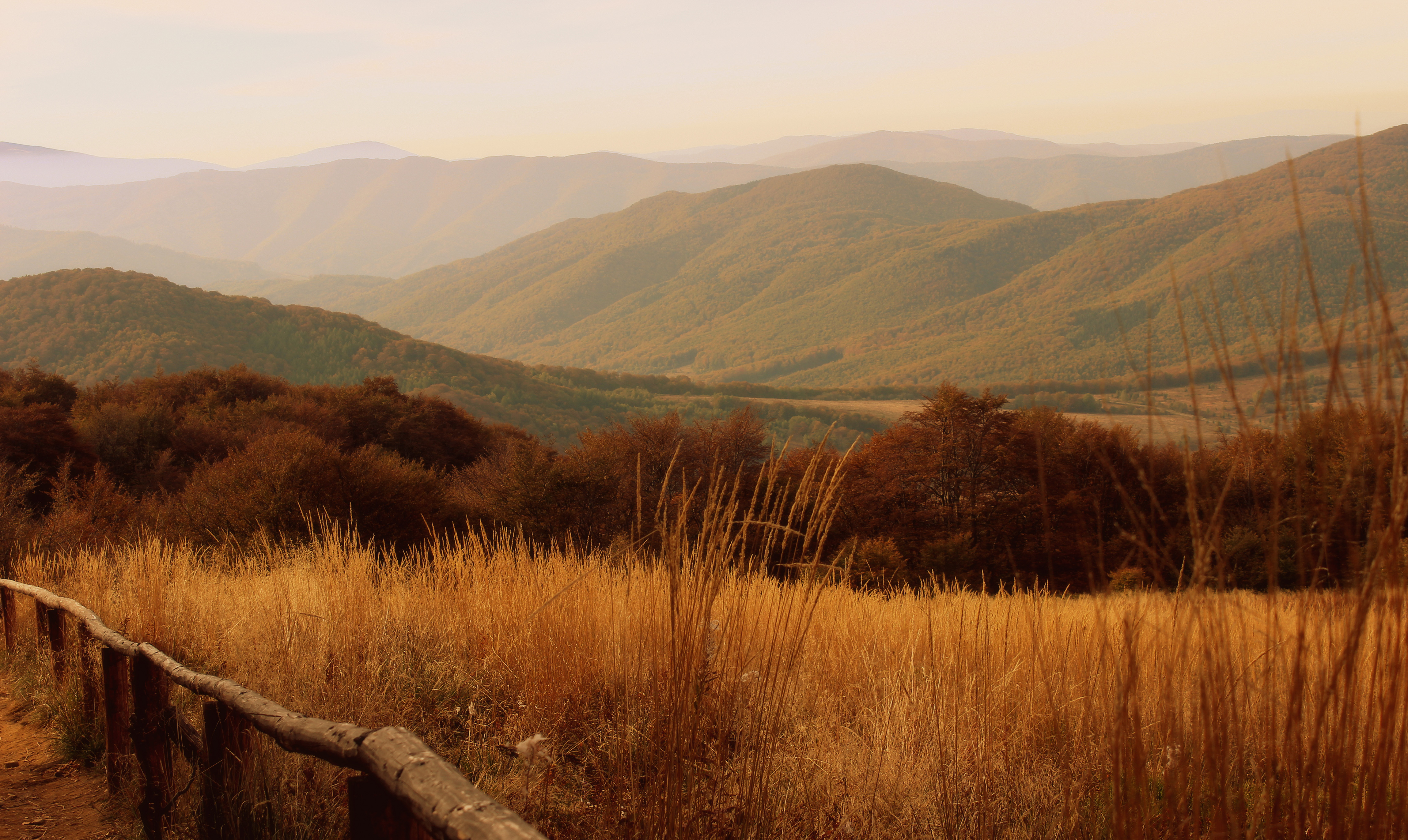 Park narodowy: Bieszczadzki Park Narodowy This is a photography of protected area with CRFOP ID PL.ZIPOP.1393.PN.7